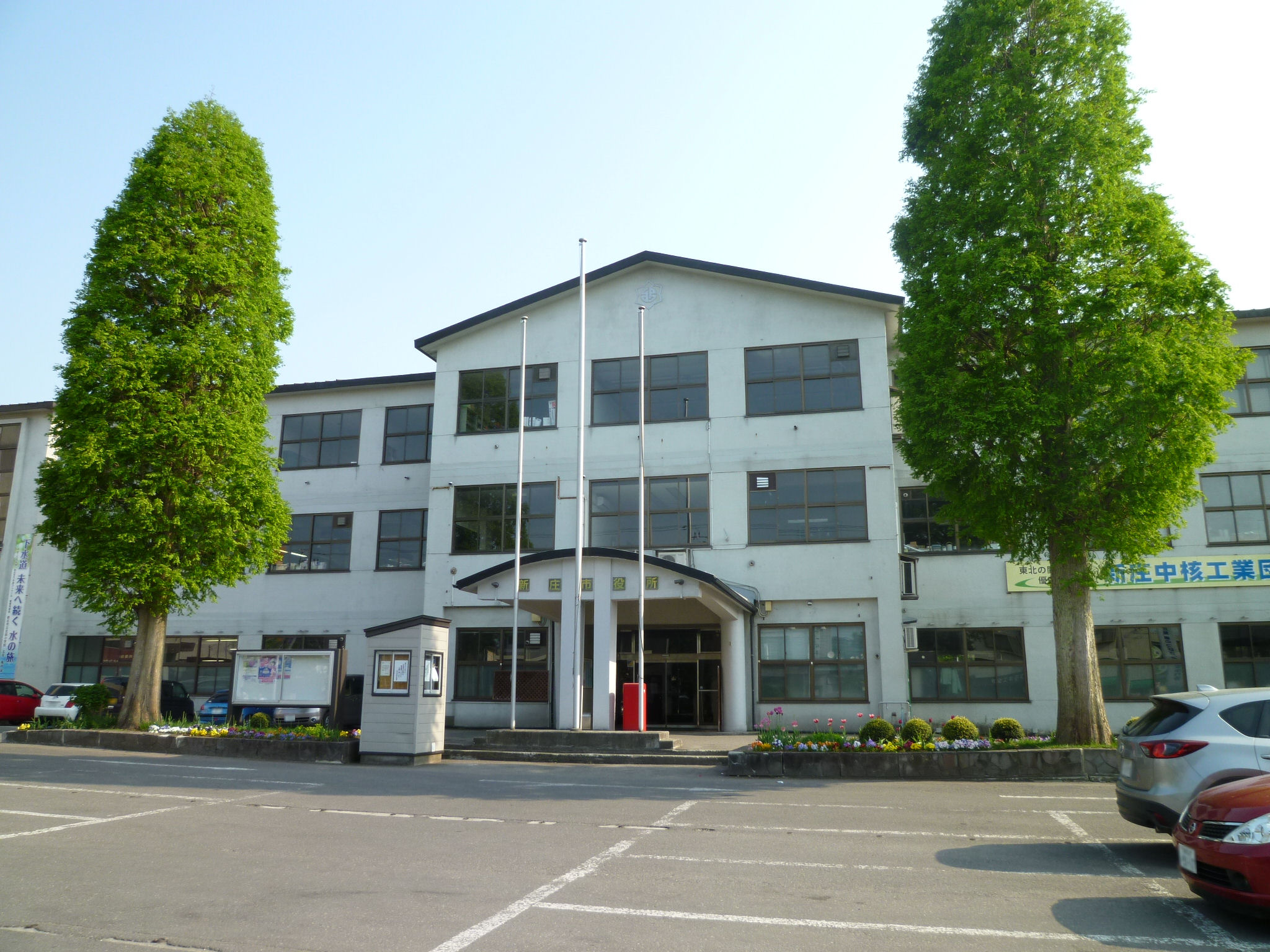 新庄市役所本庁舎。 山形県新庄市沖の町所在。